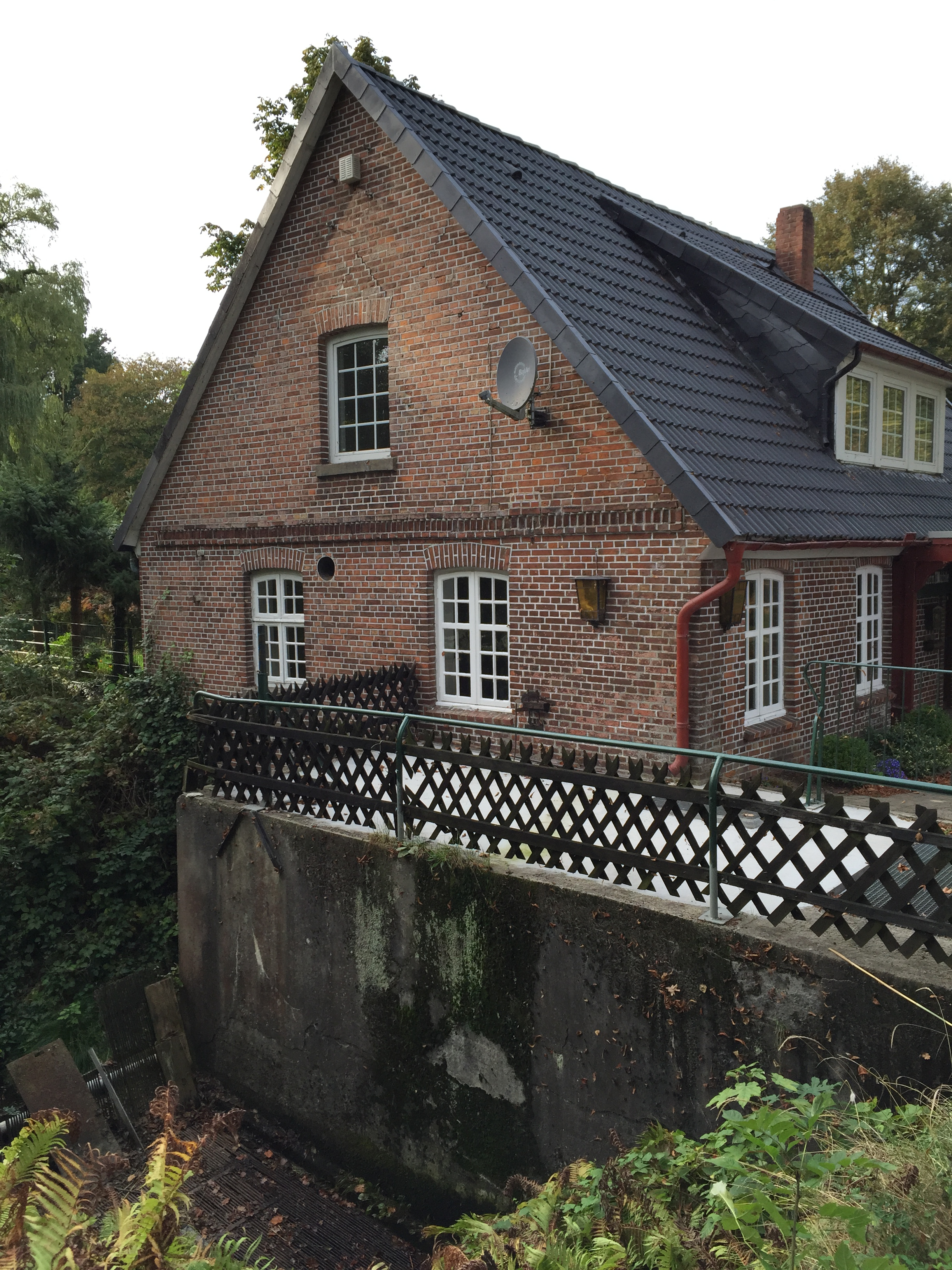 Ehemalige Wassermühle Appelbeck